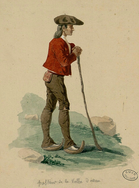 Berger de la vallée d'Ossau vers 1861. Fonds Ancely. Bibliothèque de Toulouse.